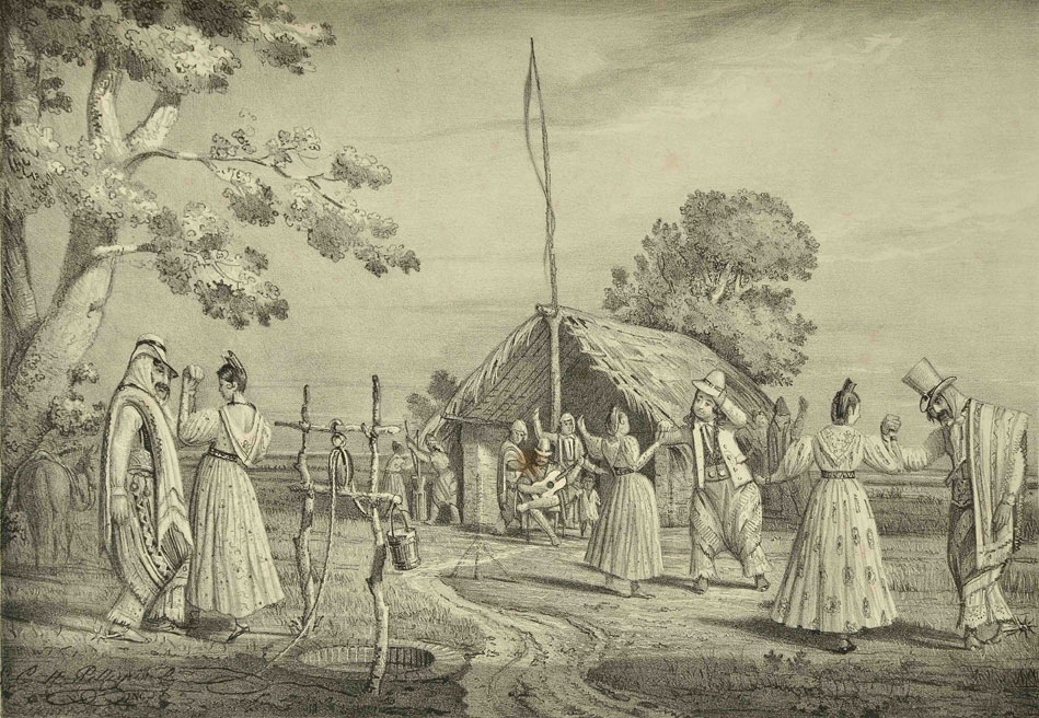 Recuerdos del Río de la Plata. Buenos Aires, en la Litografía de las Artes, 1841. In folio. 46x29 cm